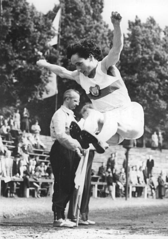 Annemarie Klausner Zentralbild Vlocka 22.7.1956 VII. DDR-Leichtathletik-Meisterschaften in Erfurt. In der Zeit vom 20. bis zum 22. Juli 1956 werden in Erfurt die VII. Leichtathletik-Meisterschaften der DDR ausgetragen. UBz: Mit dem zweiten Platz im Weitsprung mußte sich die DDR-Rekordhalterin Annemarie Klausner (Motor Jena) zufriedengeben. Clausner während des Sprunges.